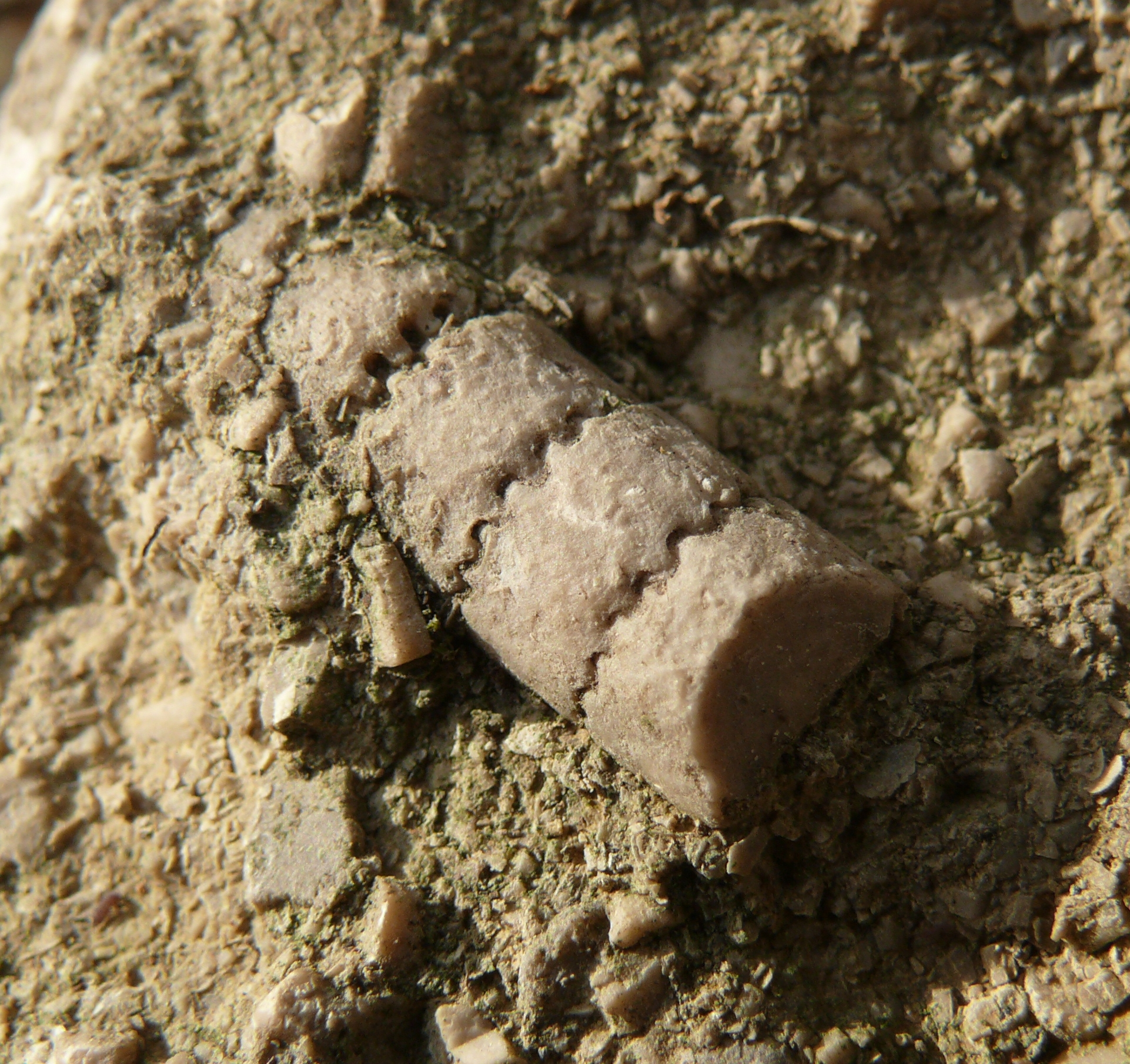 Stielglieder von Encrinus liliiformis aus dem Oberen Muschelkalk bei Kirchberg/Jagst